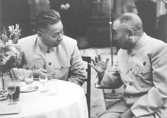 1951年，刘少奇和黄炎培亲切交谈